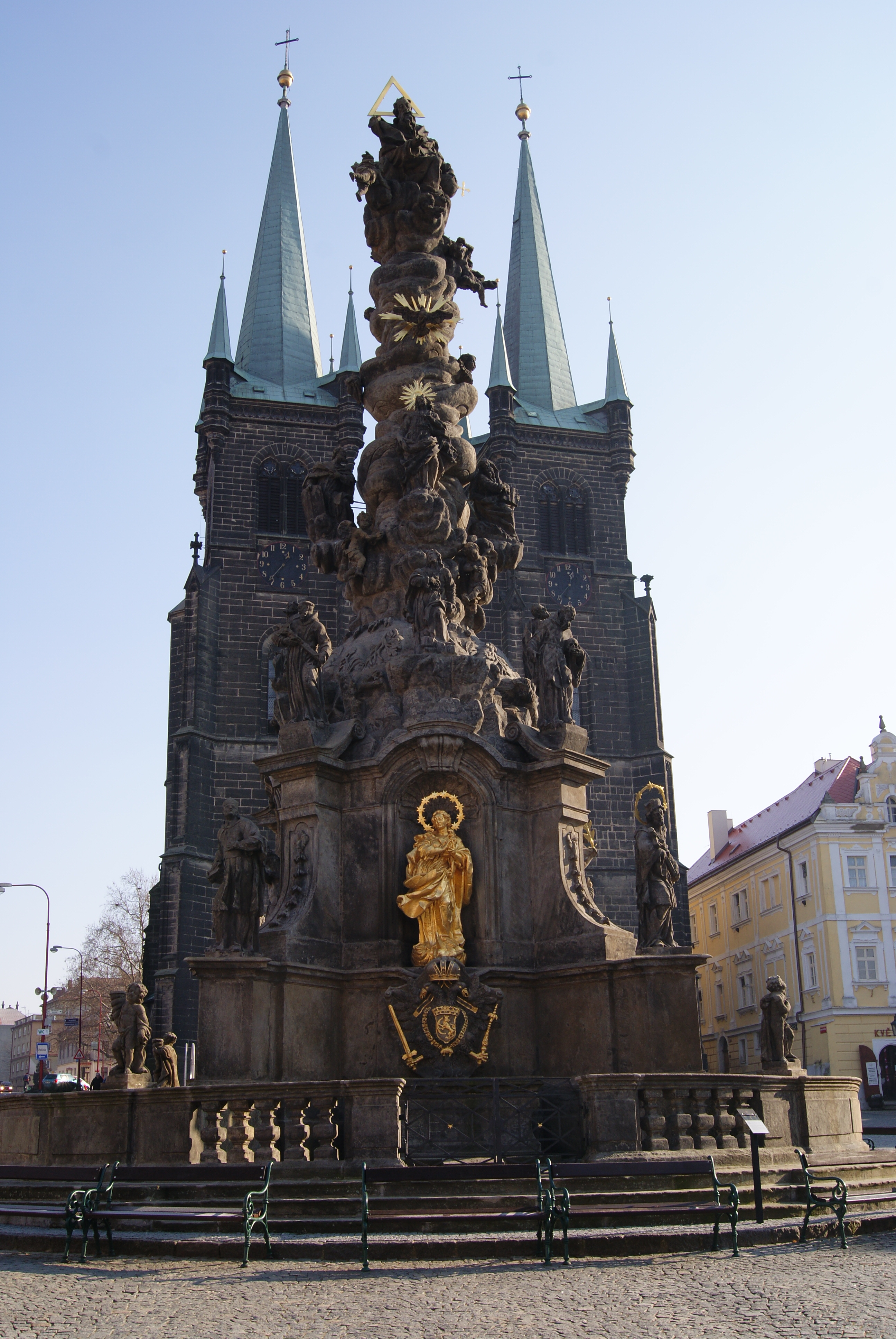 Česky: Sloup Proměnění Páně v Chrudimi na Resselově náměstí. Dílo vytvořili Jan Pavel Čechpauer a Ignác Rohrbach.